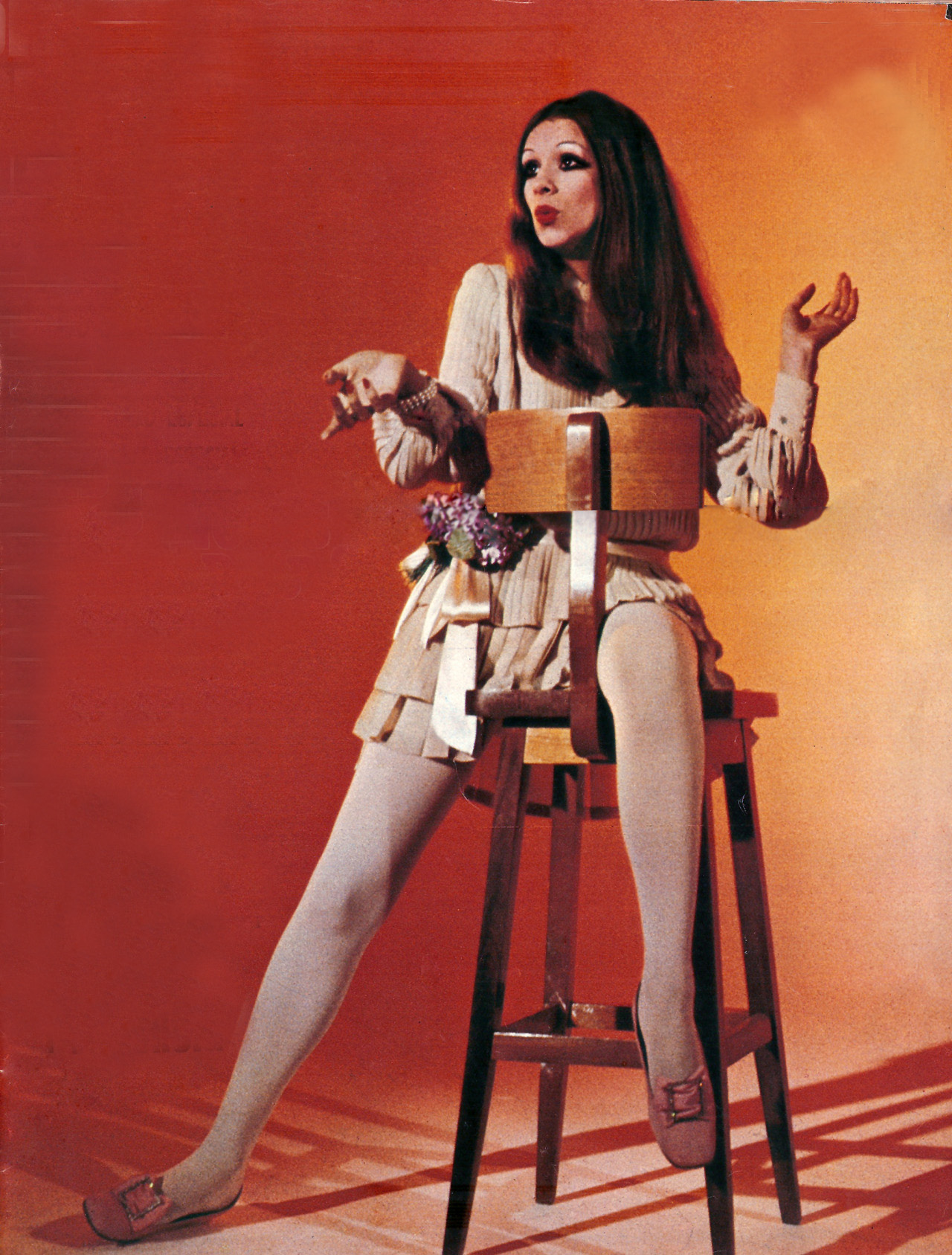 La actriz argentina Nacha Guevara en la portada de la revista Siete Días Ilustrados.